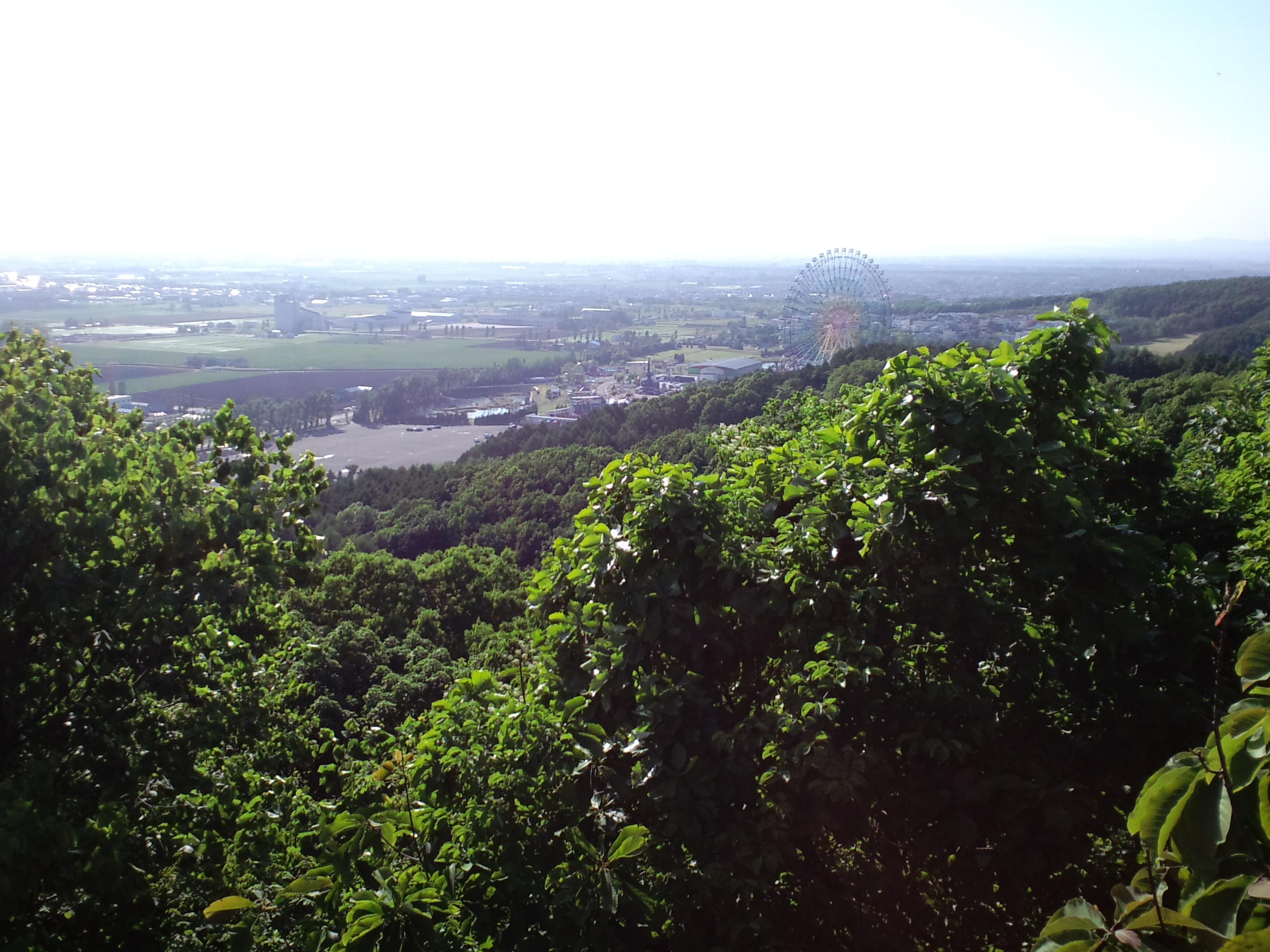 いわみざわ公園・園内俯瞰